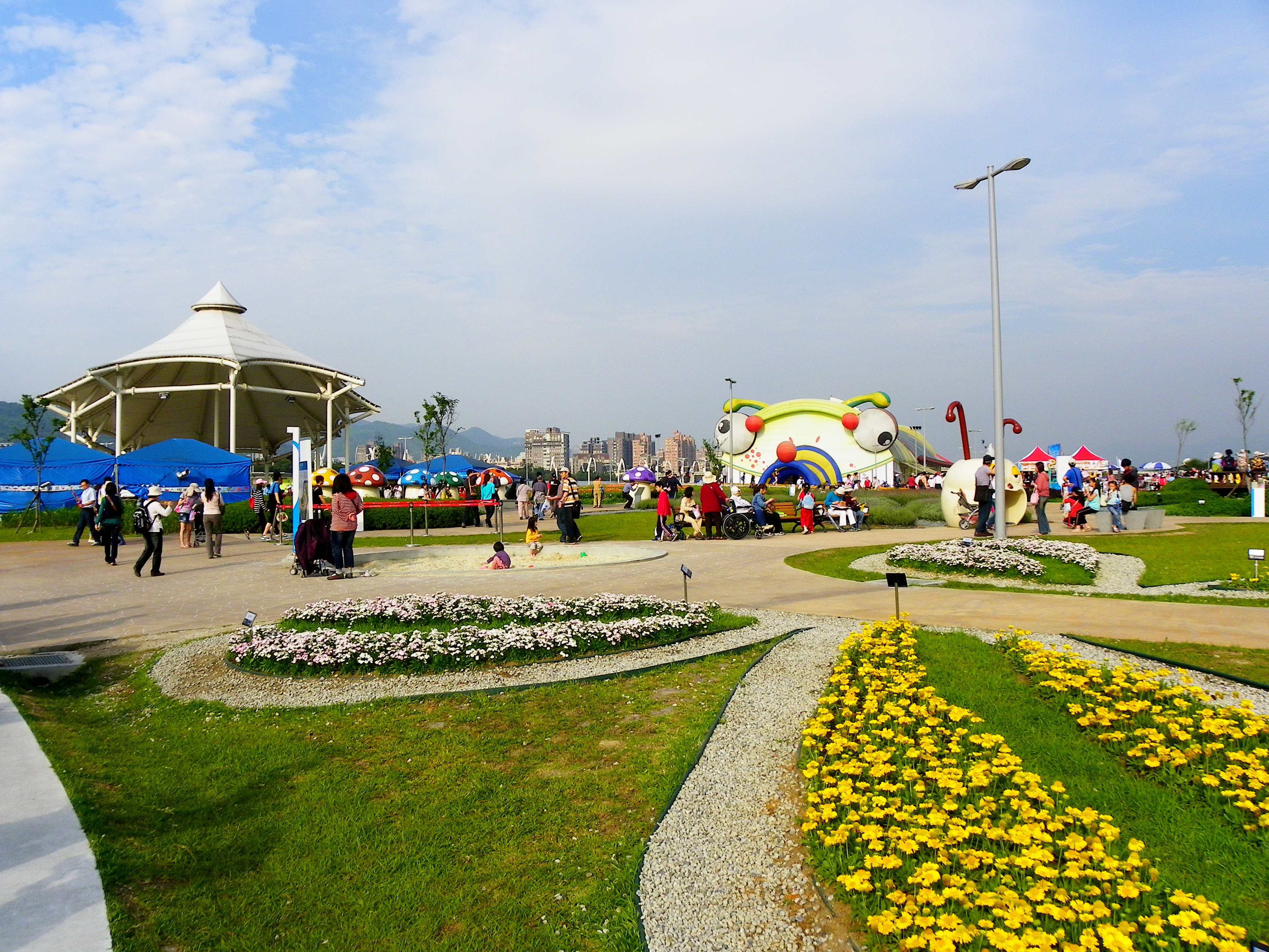 臺北國際花博大佳河濱公園區。